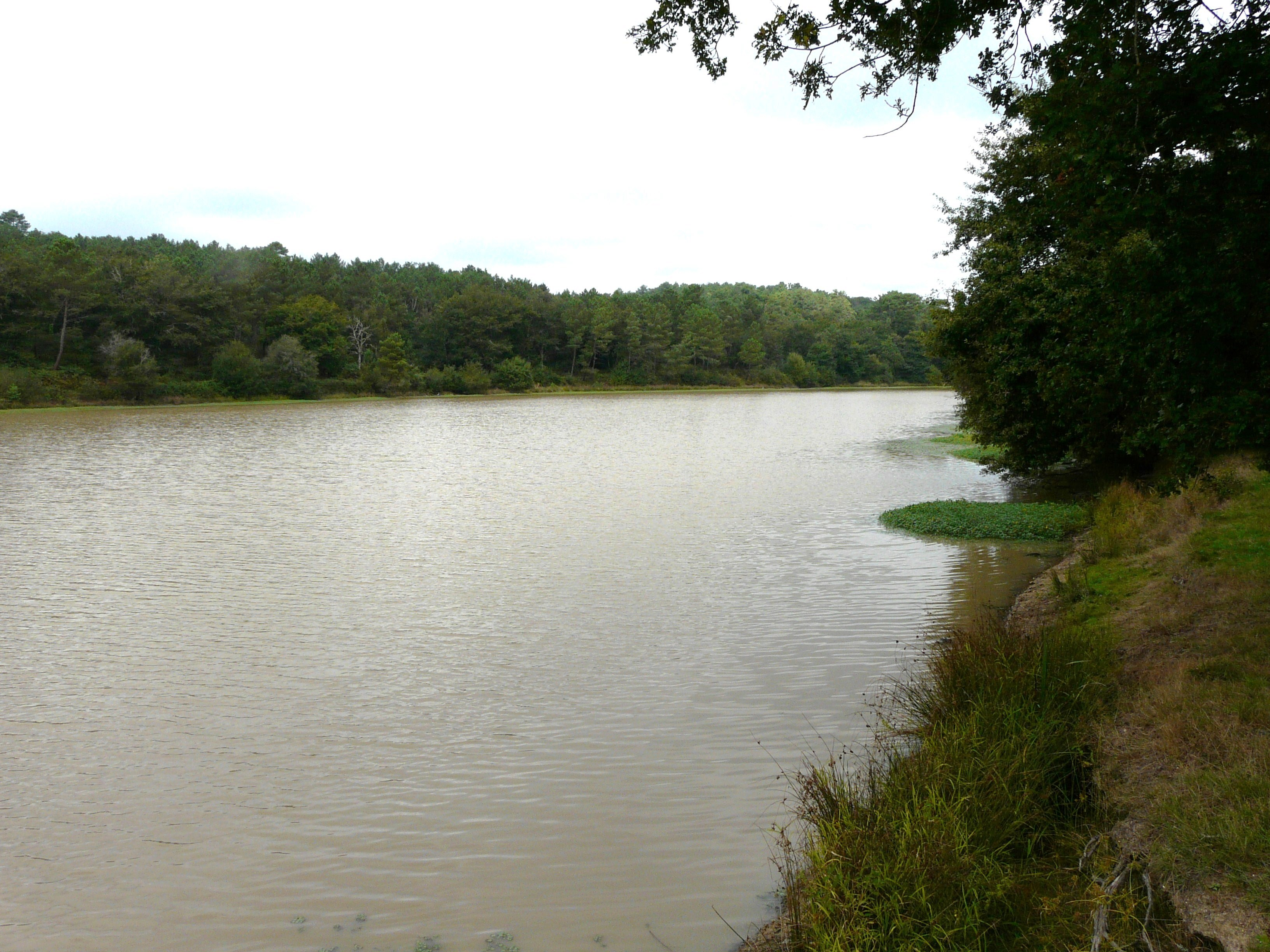 L'étang de Farganaud (superficie : 15 ha) sur le ruisseau du même nom, à Saint-Laurent-des-Hommes. La boucle de l'étang mesure 2,5 km.